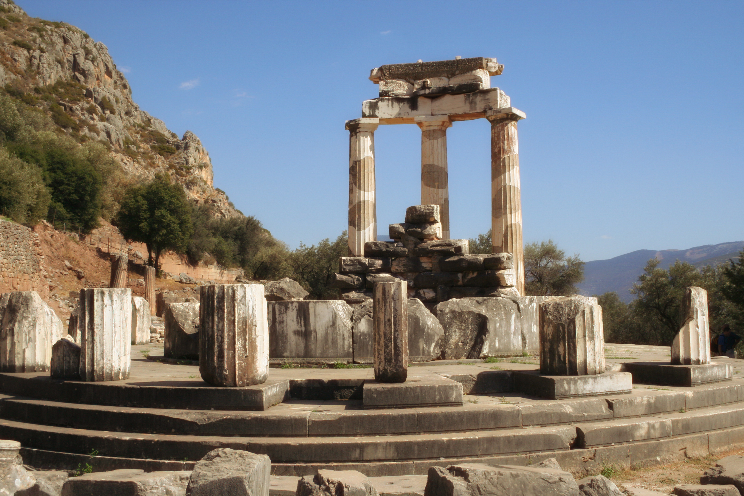 Tholos im Heiligtum der Athena Pronaia Delphi war eine Stadt im antiken Griechenland, die vor allem für ihr Orakel bekannt war. Seit 1987 gehören die Ausgrabungen von Delphi zur Liste des Weltkulturerbes der UNESCO. Mittelgriechenland